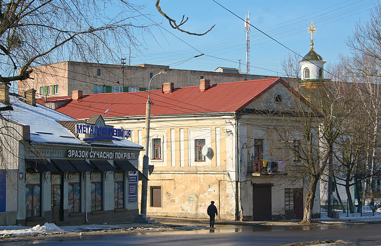 Market Square